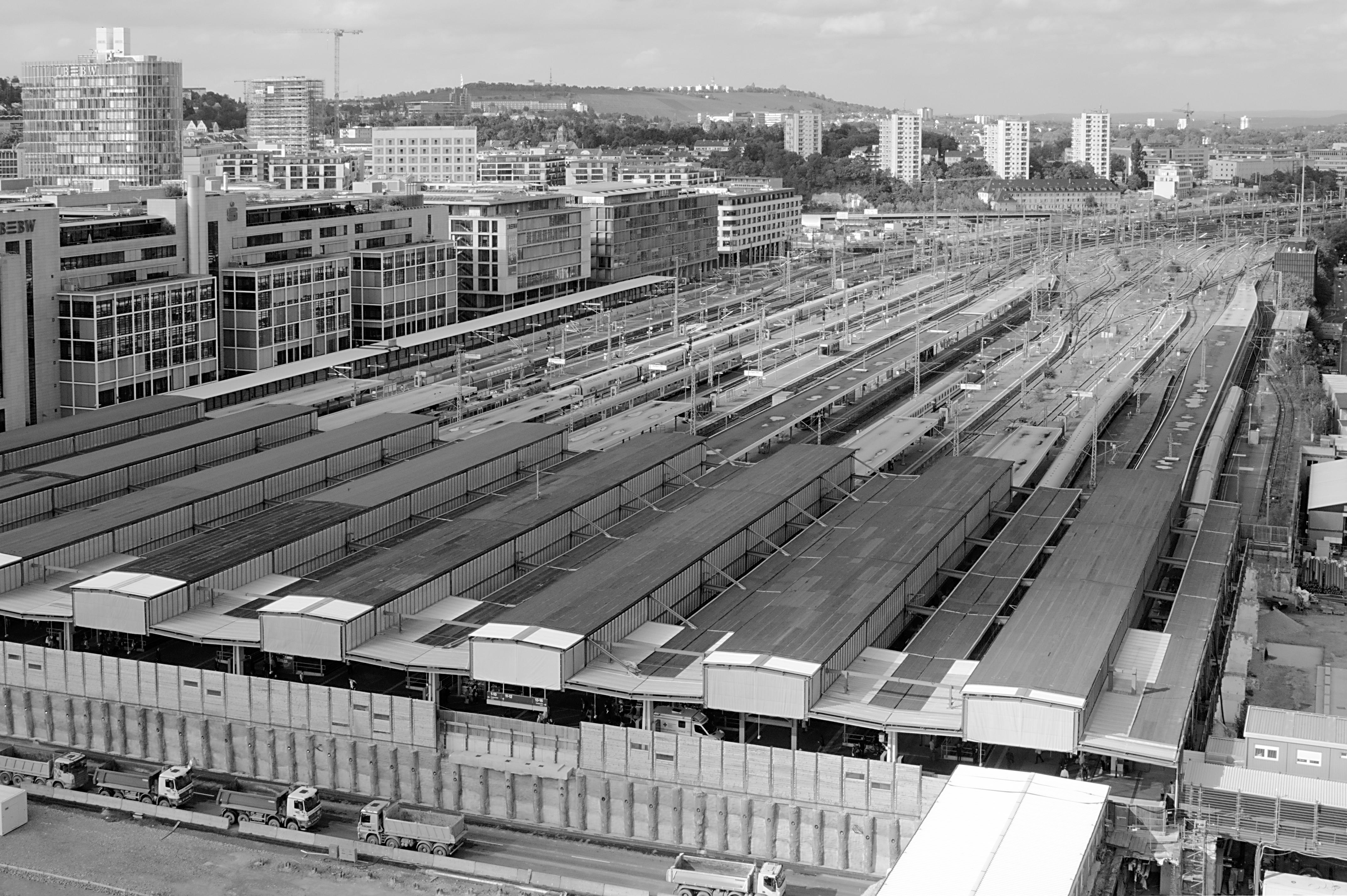 Stuttgart Hauptbahnhof, Blick vom Bahnhofsturm auf die Bahnsteige